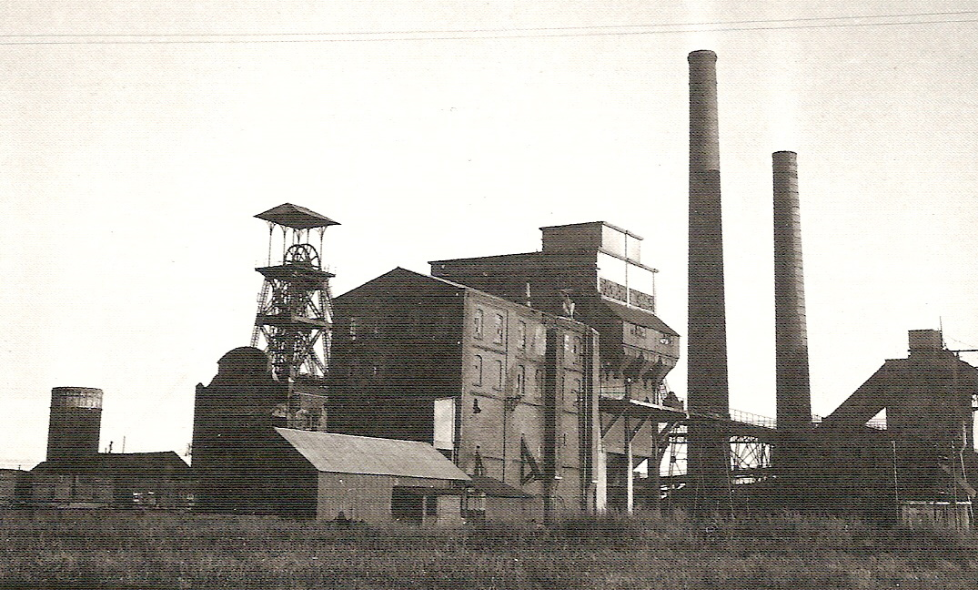 La Fosse n° 2 - 2 bis de la Compagnie des mines de Crespin était un charbonnage constitué de deux puits situé à Quiévrechain, Nord, Nord-Pas-de-Calais, France.